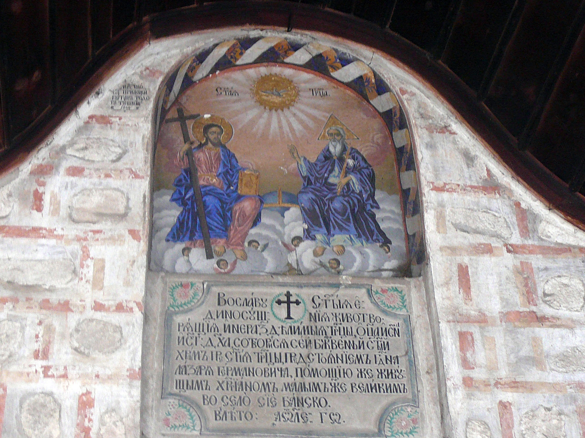 Bansko,Bulgaria